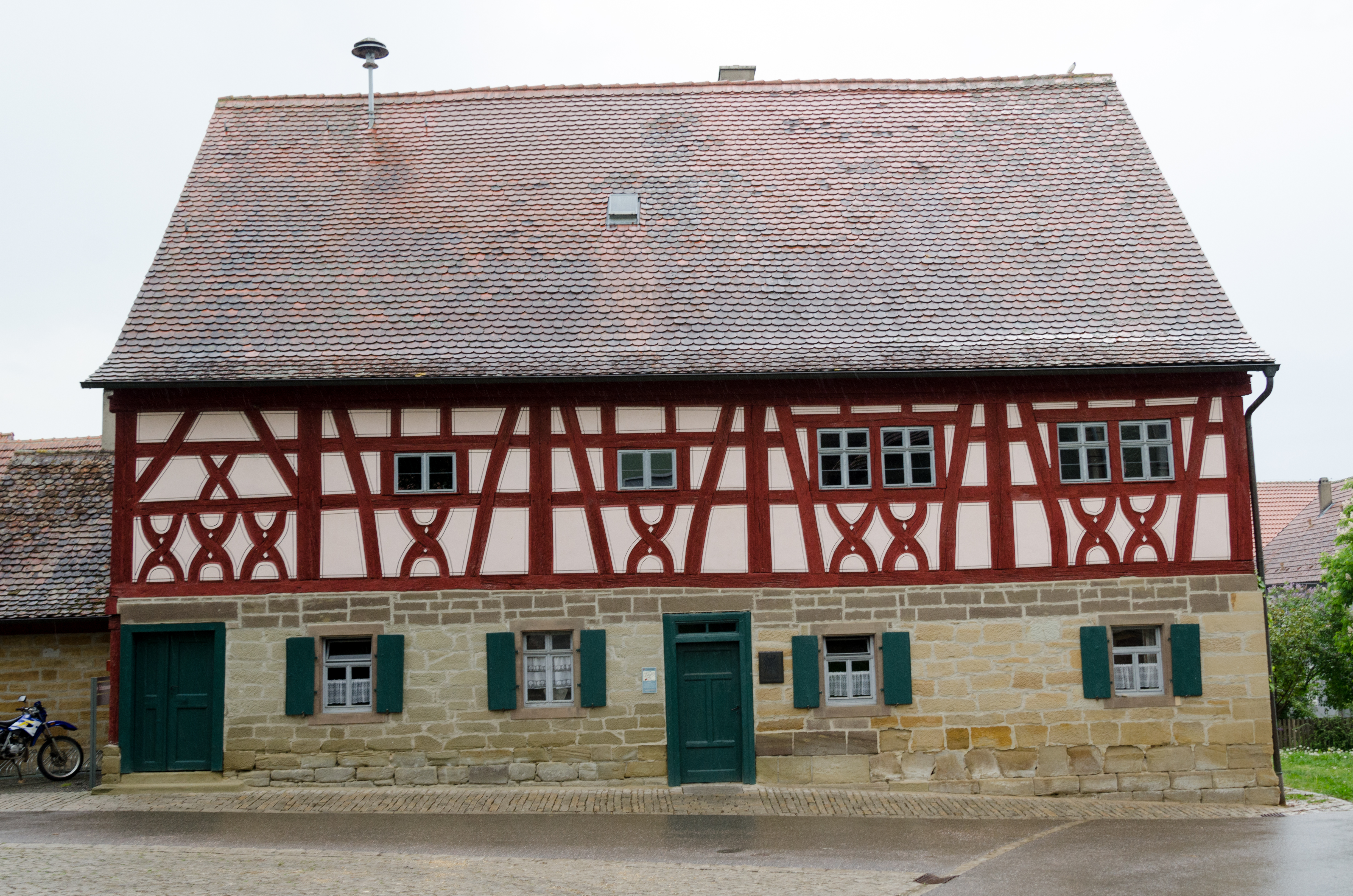 Iphofen, Mönchsondheim, An der Kirchenburg 2